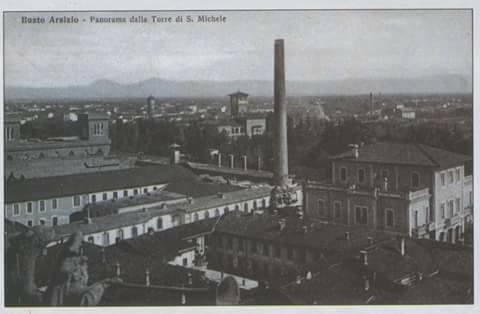 La ciminiera del Cotonificio Bustese a Busto Arsizio, distrutta dal ciclone del 1910.